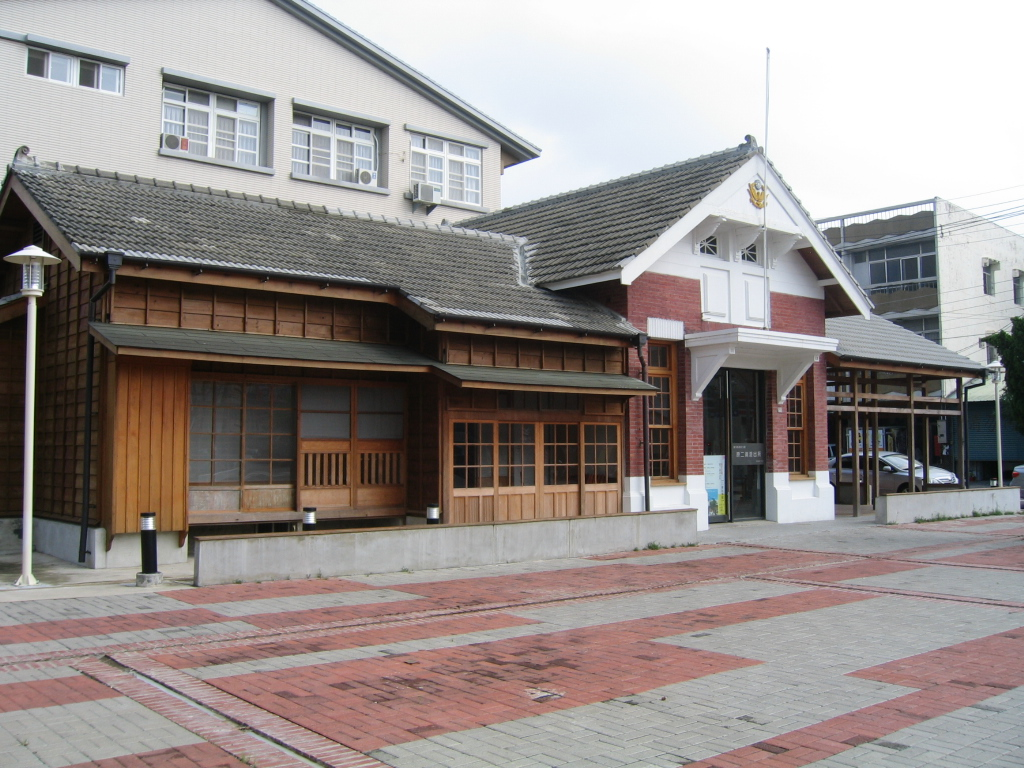 原二崙派出所，雲林縣二崙鄉崙西村中山路102號